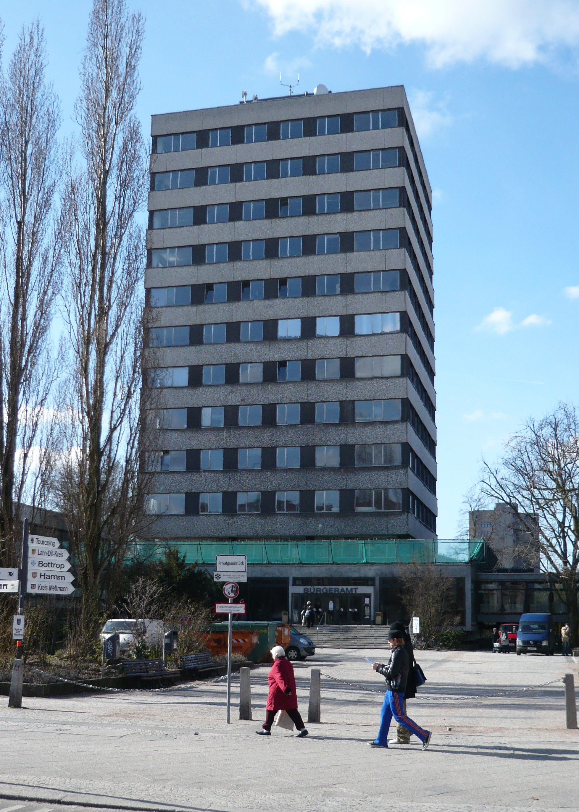 Rathaus Wedding in der Müllerstraße, "Neubau"